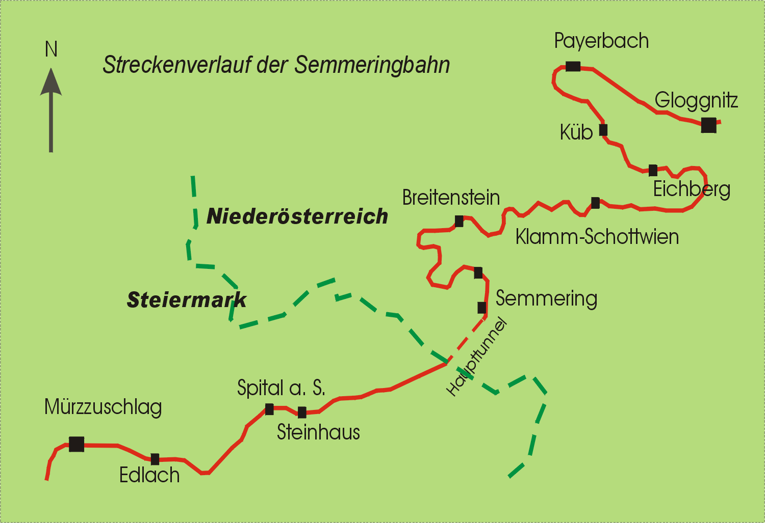 Verlauf der Semmeringbahn